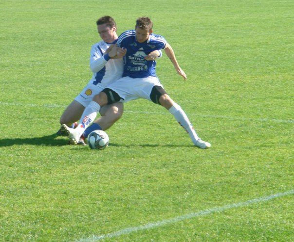 Roy for Surnadal IL